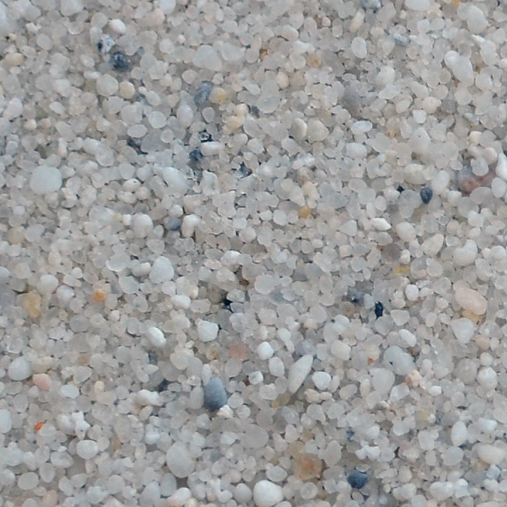 Quarzsandkörner aus Uhry bei Königslutter